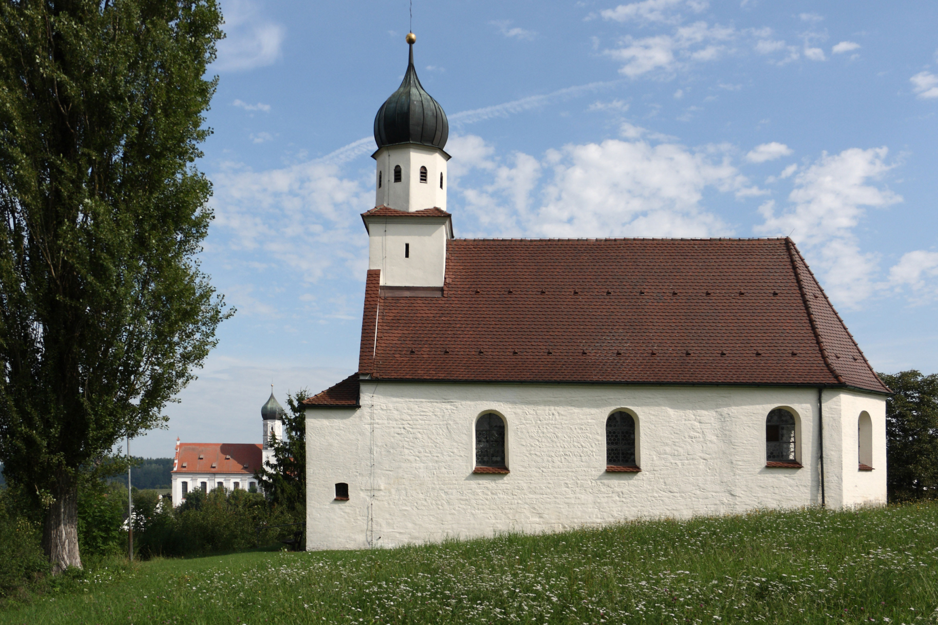 Edelstetten, Sankt-Michael-Weg 6, Kapelle Sankt Michael; im Kern romanischer Bau, Chor 15. Jh., um 1600 erneuert, Ansicht von Süden (im Hintergrund ehem. Stiftskirche)